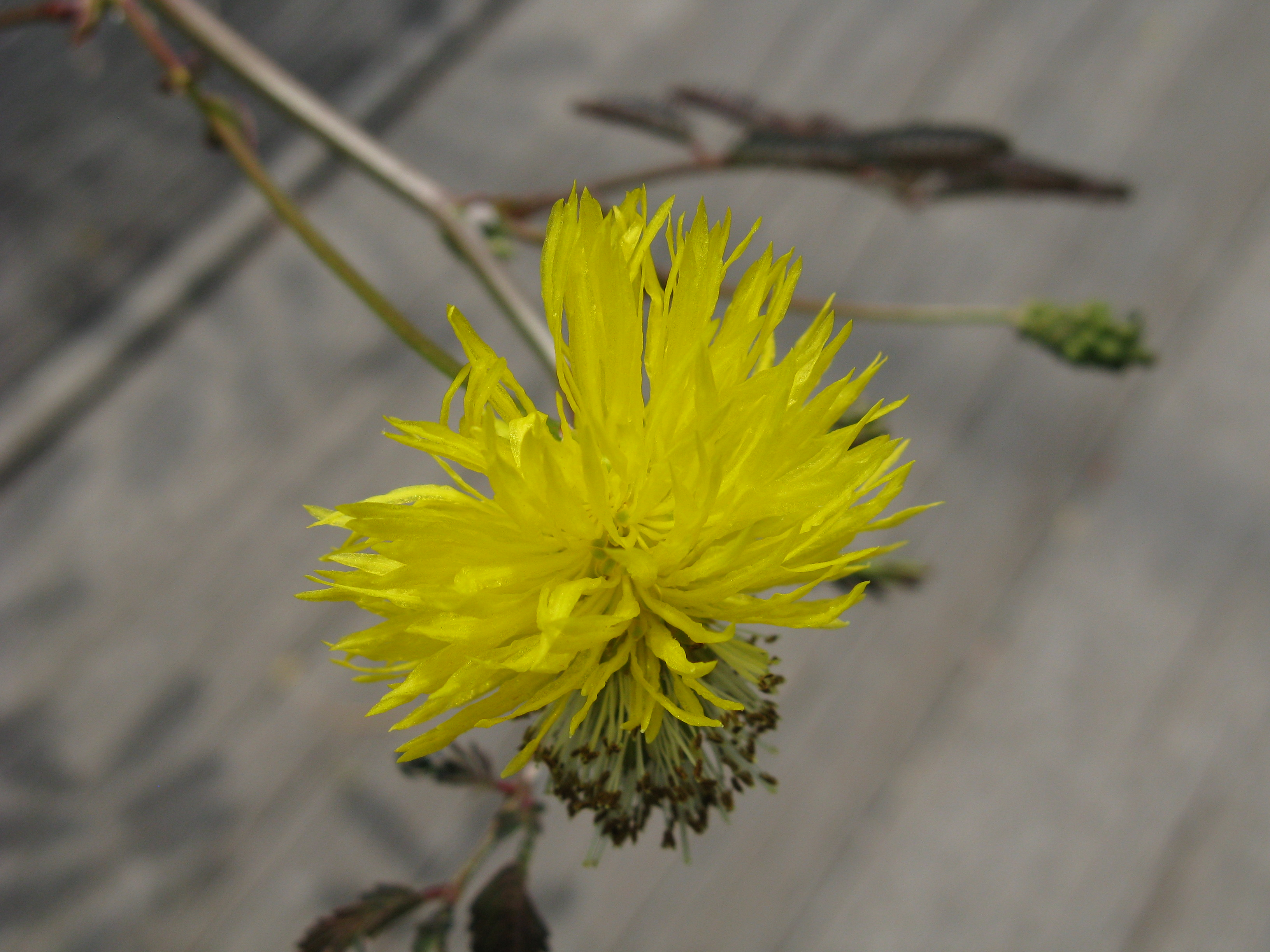 Scientific name Neptunia oleracea